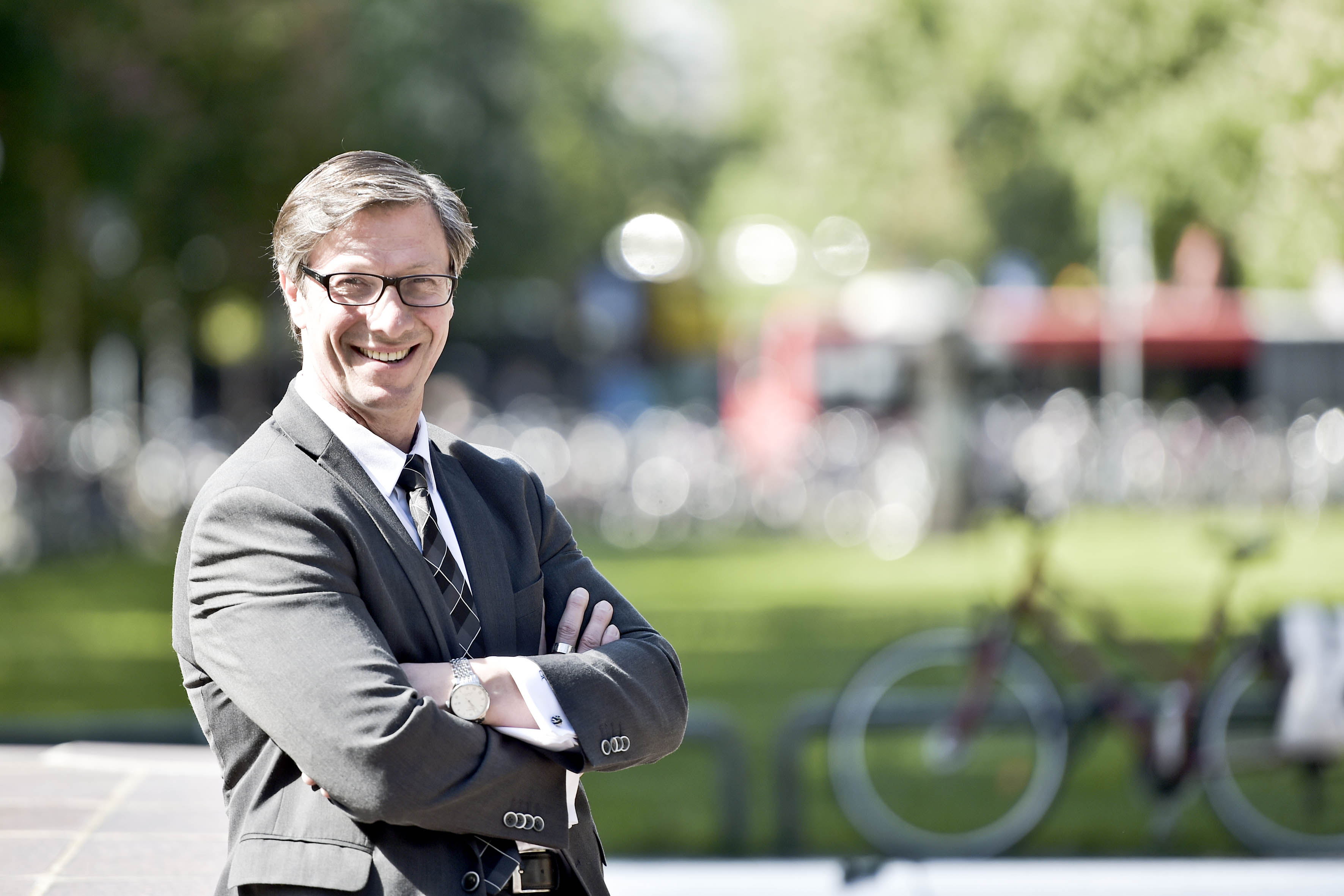 Christos Katzidis, Fotoshooting mit Wolfgang Hübner-Stauf in der Bonner Innenstadt, Kaiserplatz